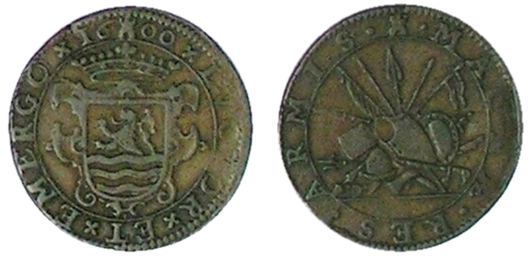 Rekenpenning Middelburg 1600, op de slag bij Nieuwpoort. Foto van eigen exemplaar.